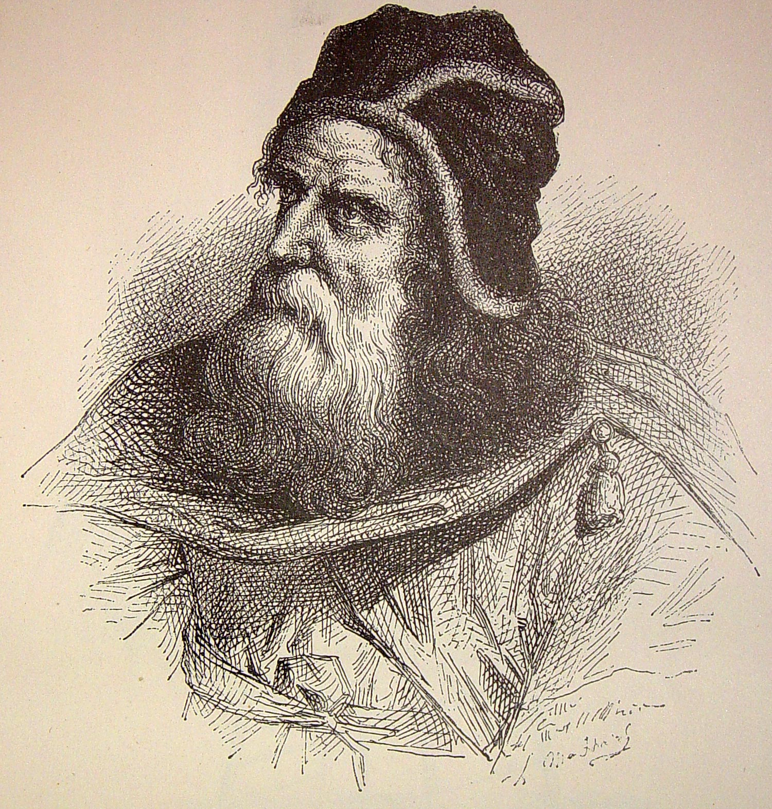 Ilustraciones pertenecientes al libro : El mundo físico : gravedad, gravitación, luz, calor, electricidad, magnetismo, etc. / A. Guillemin. - Barcelona Montaner y Simón, 1882